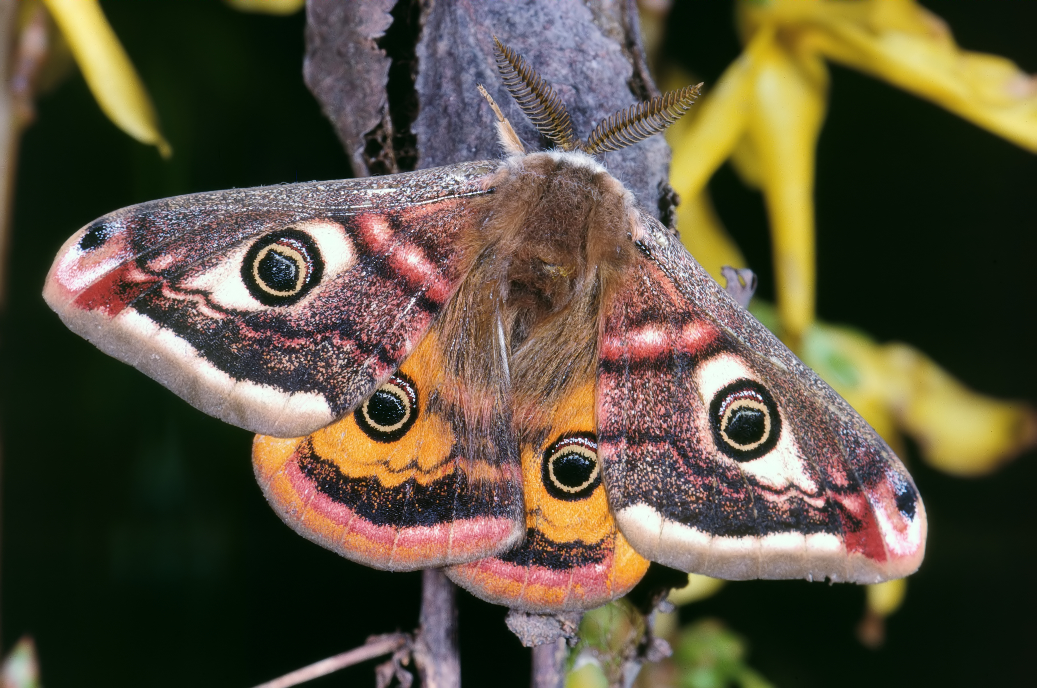 Saturnia pavonia mâle